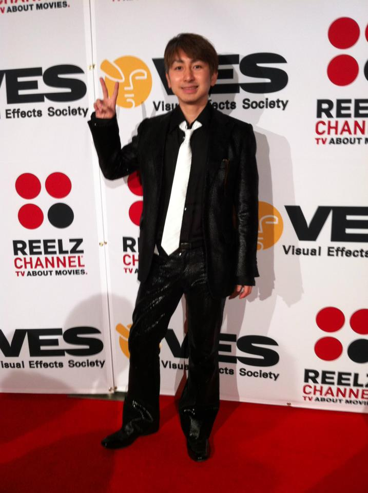 第9回VESアワードのショートアニメーション部門ノミネート